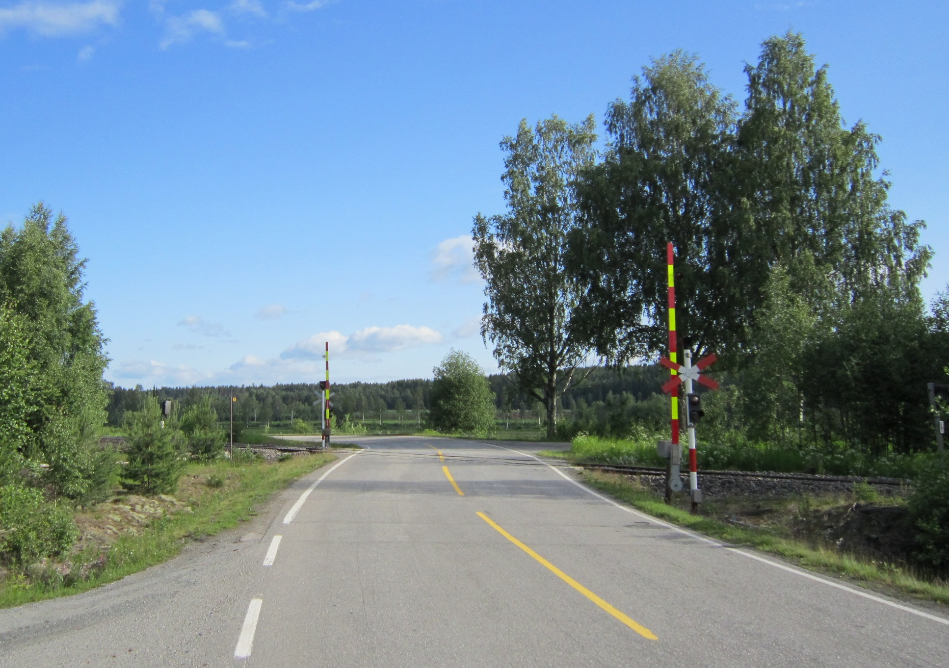 Vestsivegen (fylkesvei 505) krysser Solørbanen ved Vesterhaug i Elverum kommune.